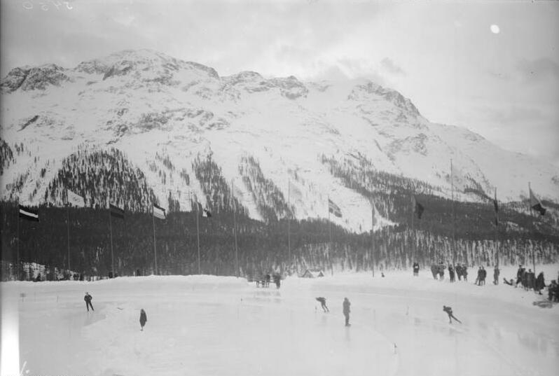 Die große Winter-Olympiade in St. Moritz! Erste Aufnahmen von unserem nach St. Moritz entsandten Sonder-Bild-Berichterstatter! Der Föhn zieht auf ! Moment aus dem 10.000 m Schlittschuhlauf, welcher wegen eintretenden Tauwetters abgebrochen werden mußte. Man sieht deutlich den über die Berge heraufziehenden Föhn.